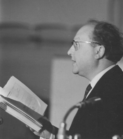 Oberstes Gericht, Globke-Prozess, Aussage, Charles Lederman Zentralbild Stöhr-10.7.1963 3. Tag des Globke-Prozesses. Vor dem 1. Strafsenat des Obersten Gerichts der DDR in Berlin wurde am 10. Juli 1963 die Hauptverhandlung gegen Globke fortgesetzt. Eine Reihe von Zeugen machten ihre Aussagen. UBz: Der Präsident der Vereinigung der Juden für Widerstand und gegenseitige Hilfe in Frankreich, Charles Lederman, Rechtsanwalt am Appellationsgericht Paris, der auf Beschluß des Gerichts als Sachverständiger gehört wurde. Er weist nach, daß die von Globke inspirierten, mitverfaßten und kommentierten faschistischen Rassegesetze und Verordnungen auch in Frankreich präzise angewandt wurden.